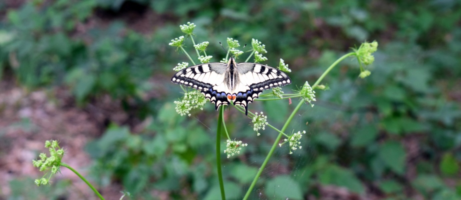 Пирятинський, Пирятинський р-н: в околицях м. Пирятин та сіл Грабарівка, Давидівка, Березова Рудка, Сасинівка, Гурбинці, Леляки, Усівка, Кейбалівка, Каплинці, Харківці, Дейманівка, Високе, Велика Круча, Повстин, Олександрівка